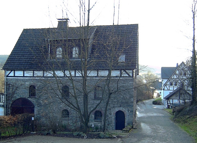 Kunsthaus Alte Mühle in Schmallenberg, Germany.